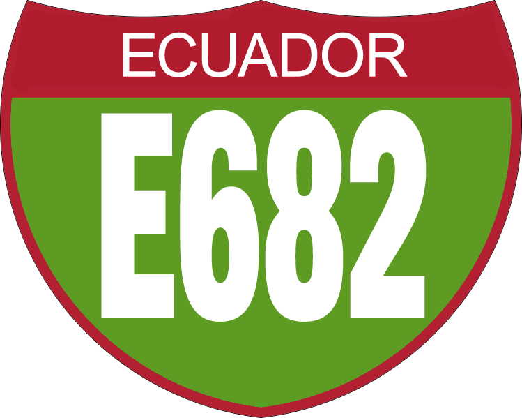 Disco de Identificación Ruta E682